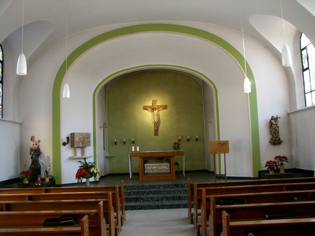 Kinderkurheim St. Johann, nun Fachklinik Maria Meeresstern, Niendorf/Ostsee, Timmendorfer Strand